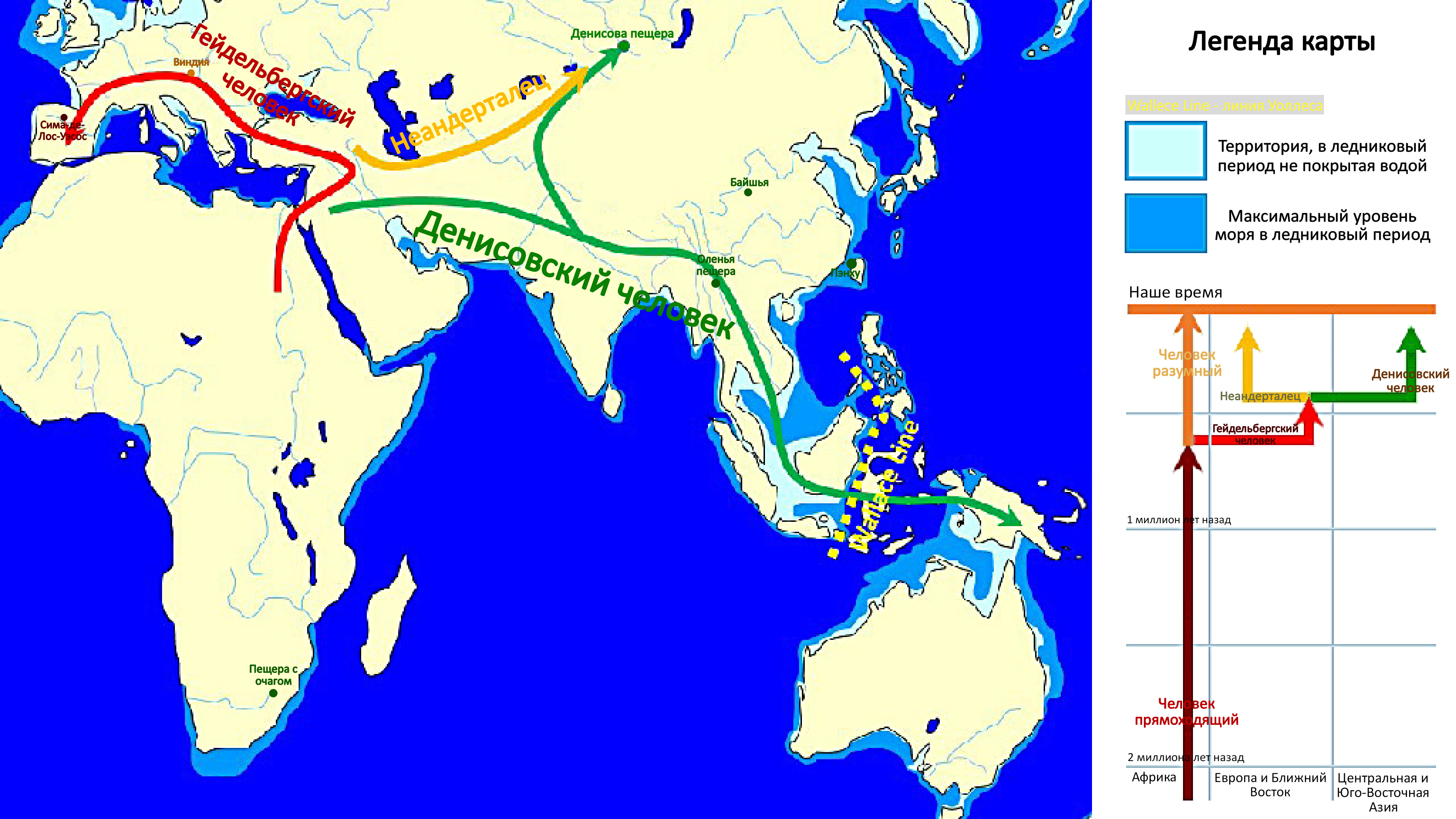 Карта с миграцией и пещерами денисовец, неандертальцев и гейдельбергских людей. Сделана для статьи о денисовском человеке.